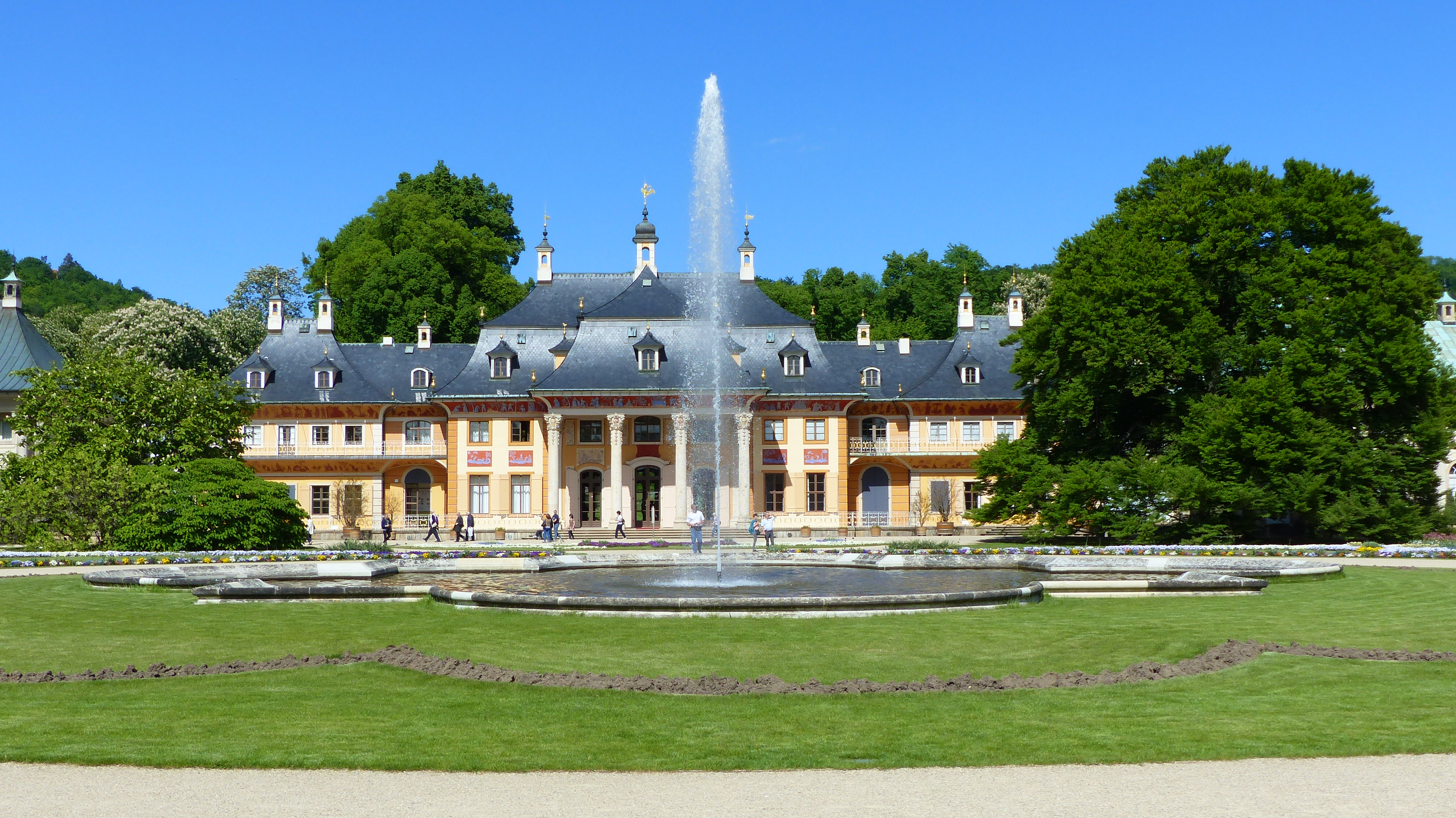 Schlossgarten Pillnitz, Dresden, Sachsen